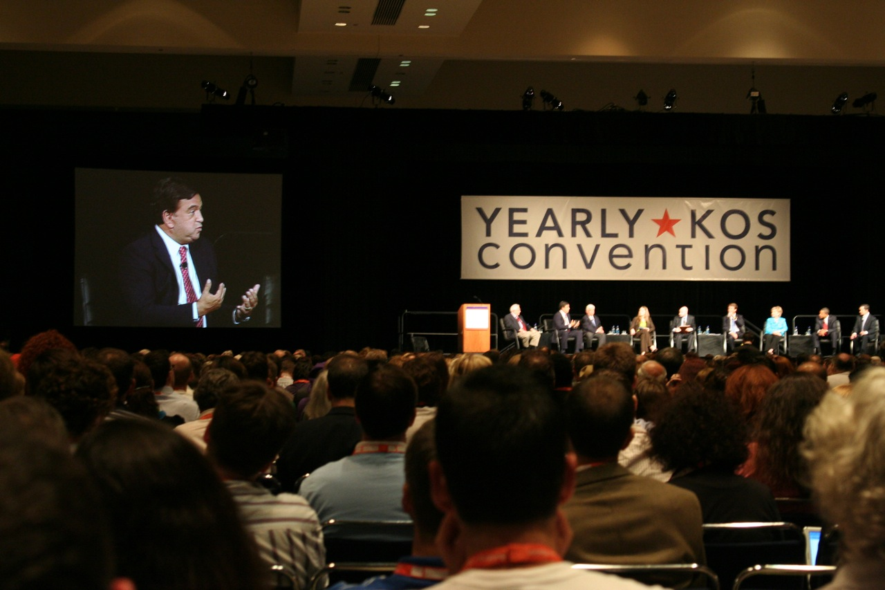 070804_yearlykos_sat_0087.JPG